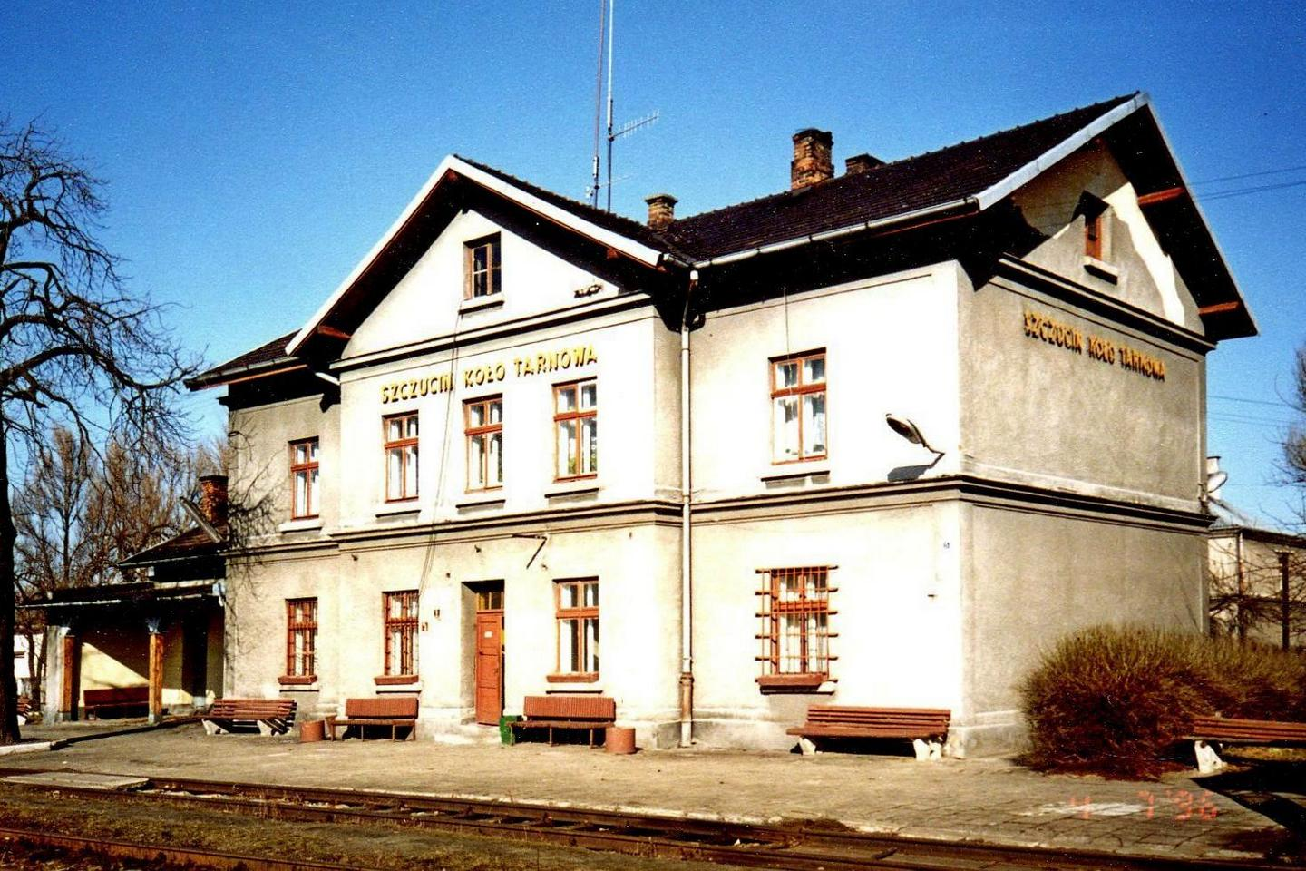 Budynek dworcowy w Szczucinie koło Tarnowa. (Olympus mju-1)